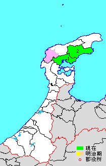 Ishikawa Hosu-gun